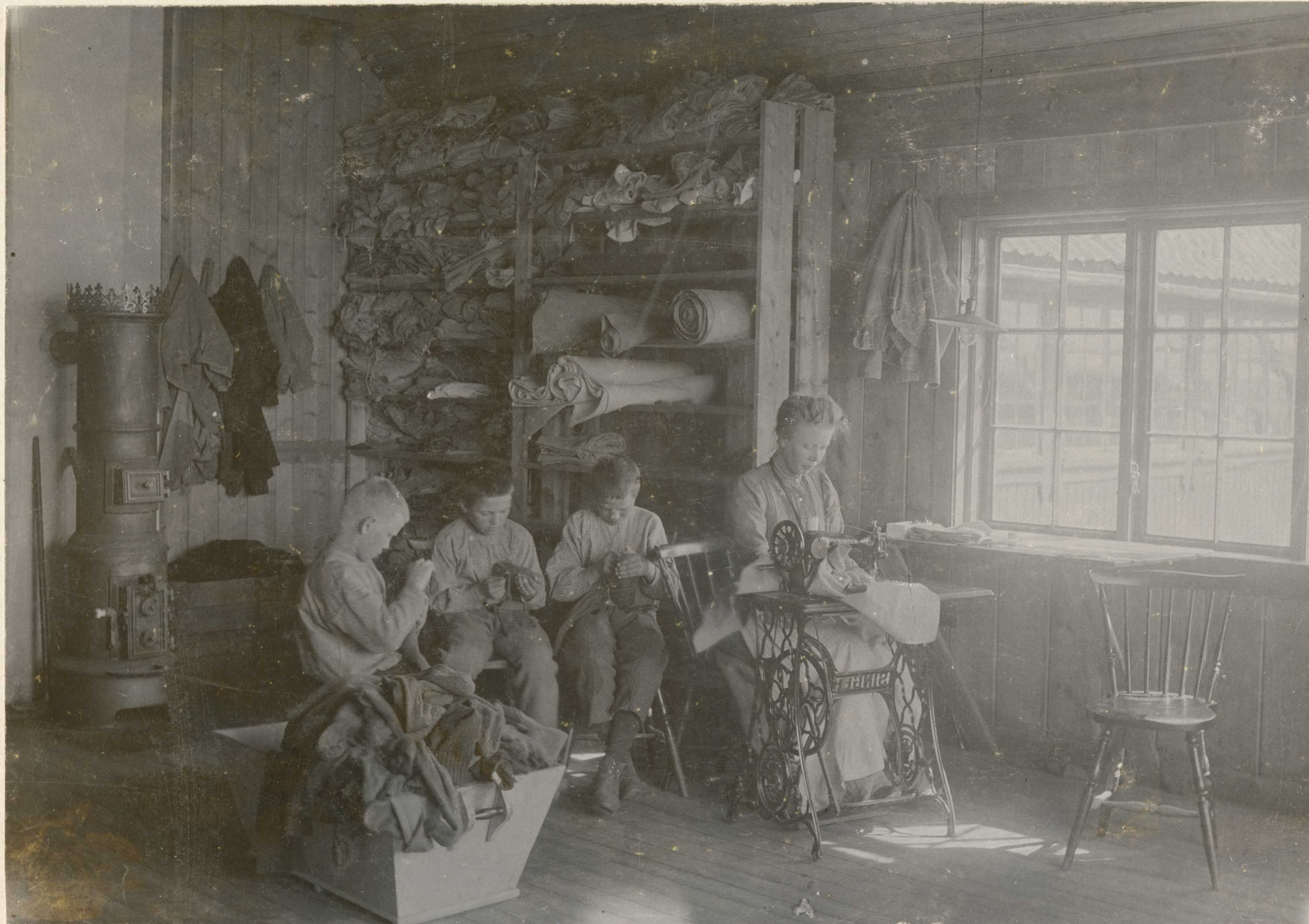 Skredderverkstedet på Bastøy skolehjem ca 1903. Fotografene Berg & Høeg, Horten.